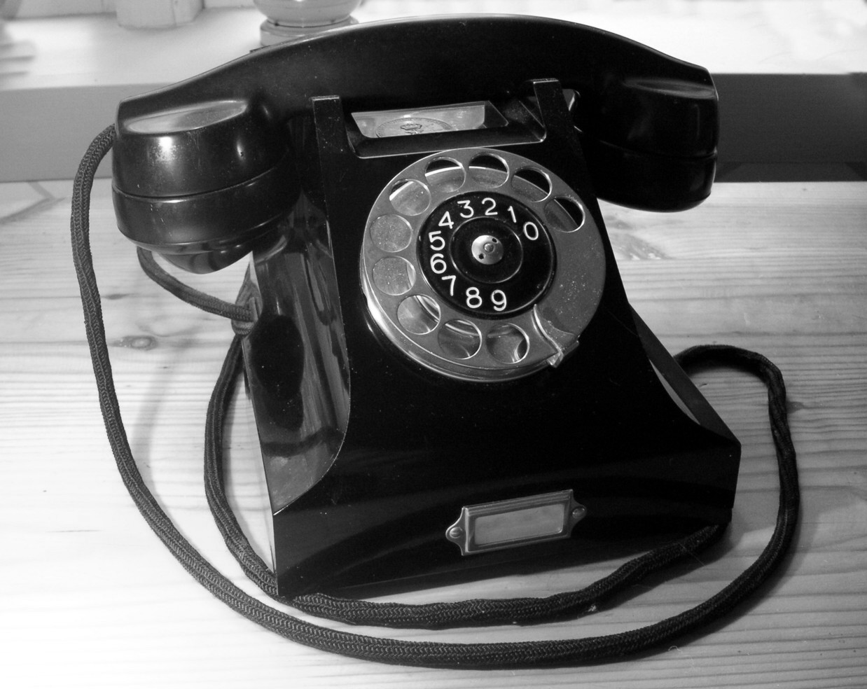 Ericssons bakelittelefon från 1931